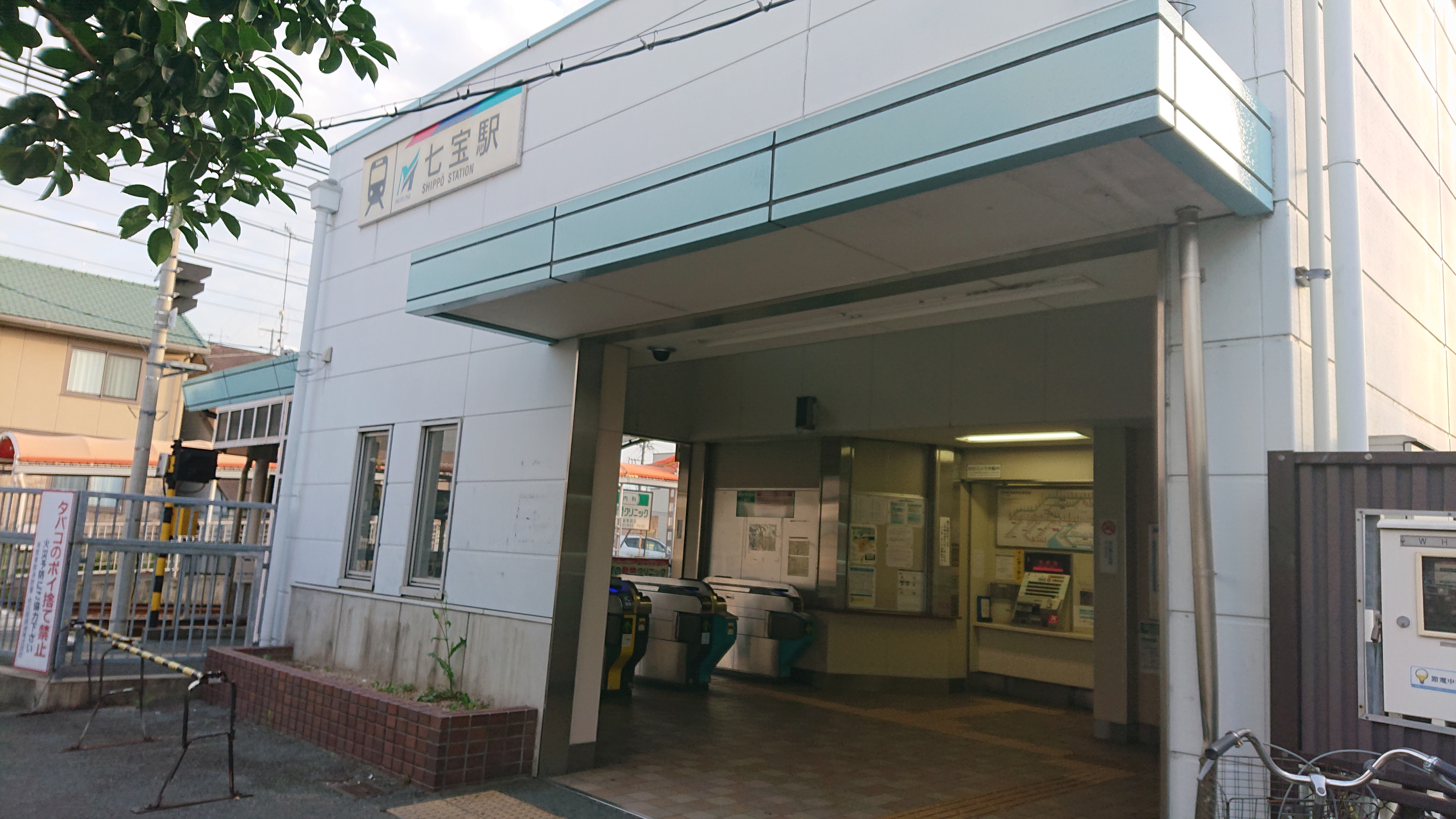 七宝駅2019/07/10